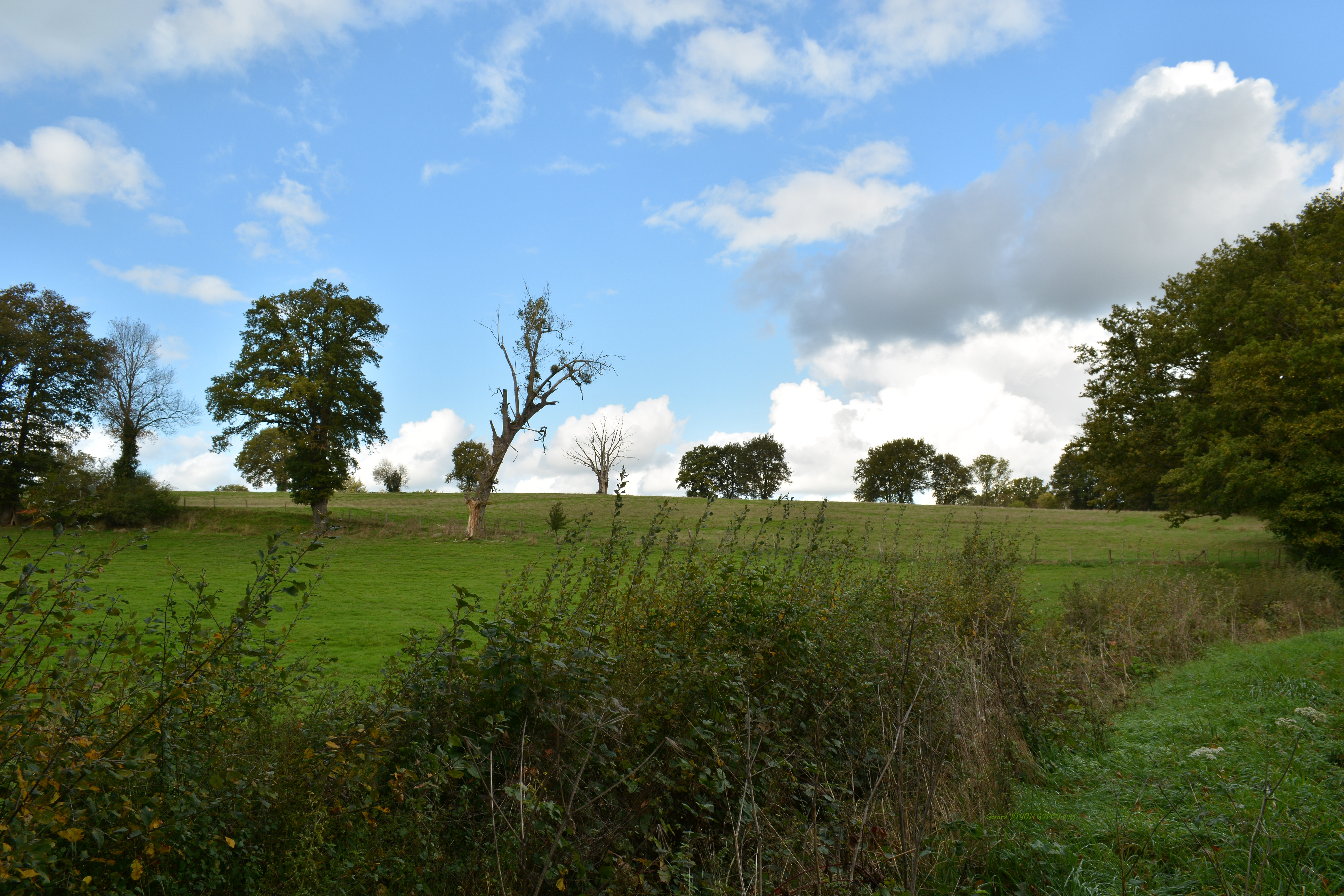 Photo prise à 4 km de GIPCY (du bourg).